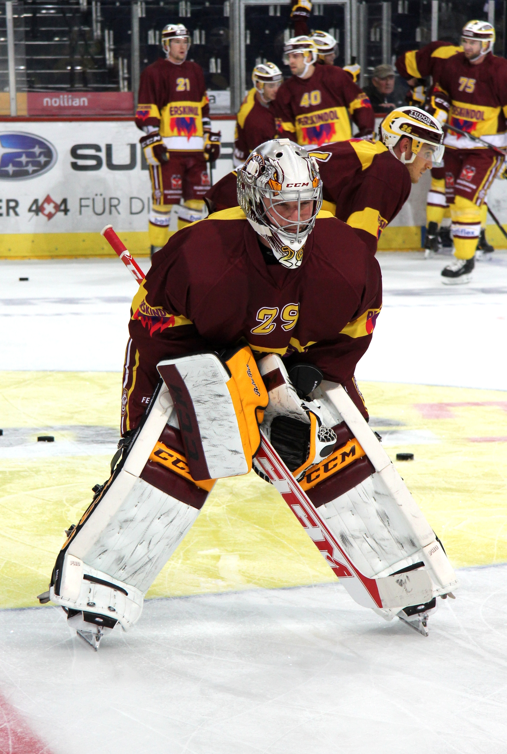 Robert Mayer (G 29).